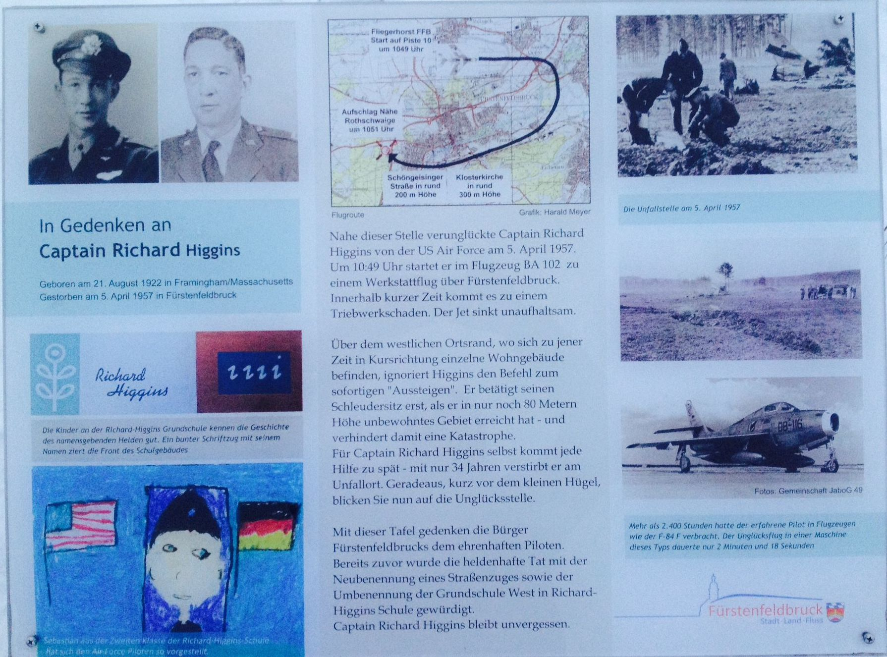 Gedenktafel zu Ehren Richard Higgins an der Absturzstelle.